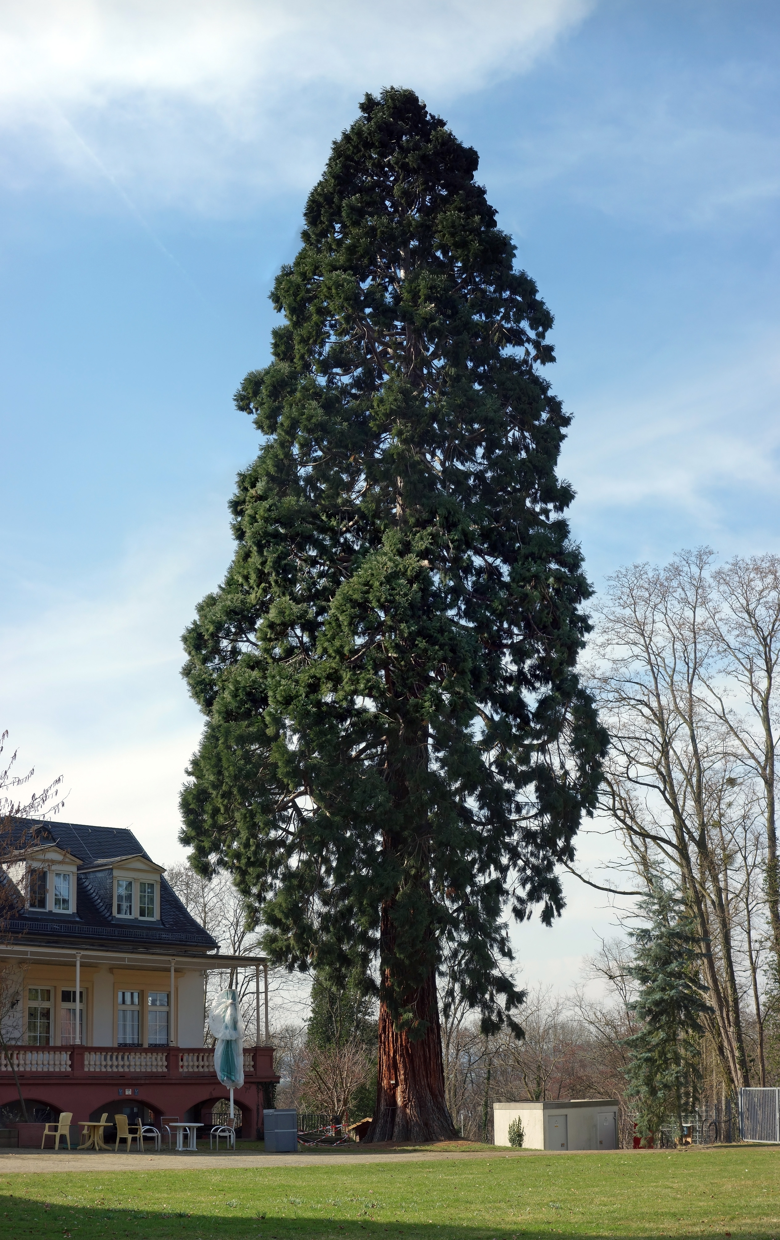 Mammutbaum Meerholz (Sequoiadendron giganteum)